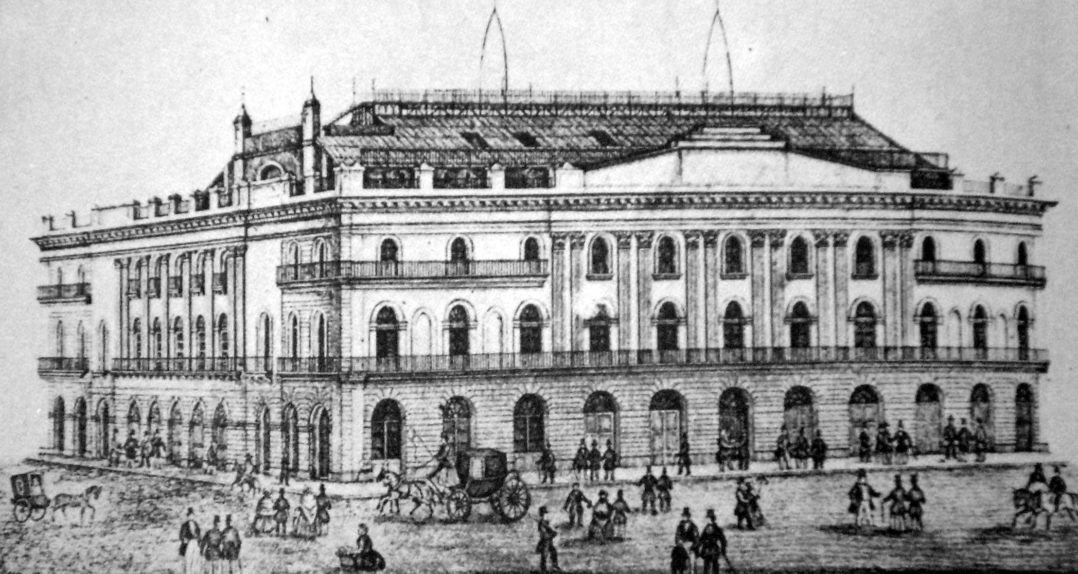 Primitivo Teatro Colón frente a la Plaza de la Victoria (actual Plaza de Mayo).